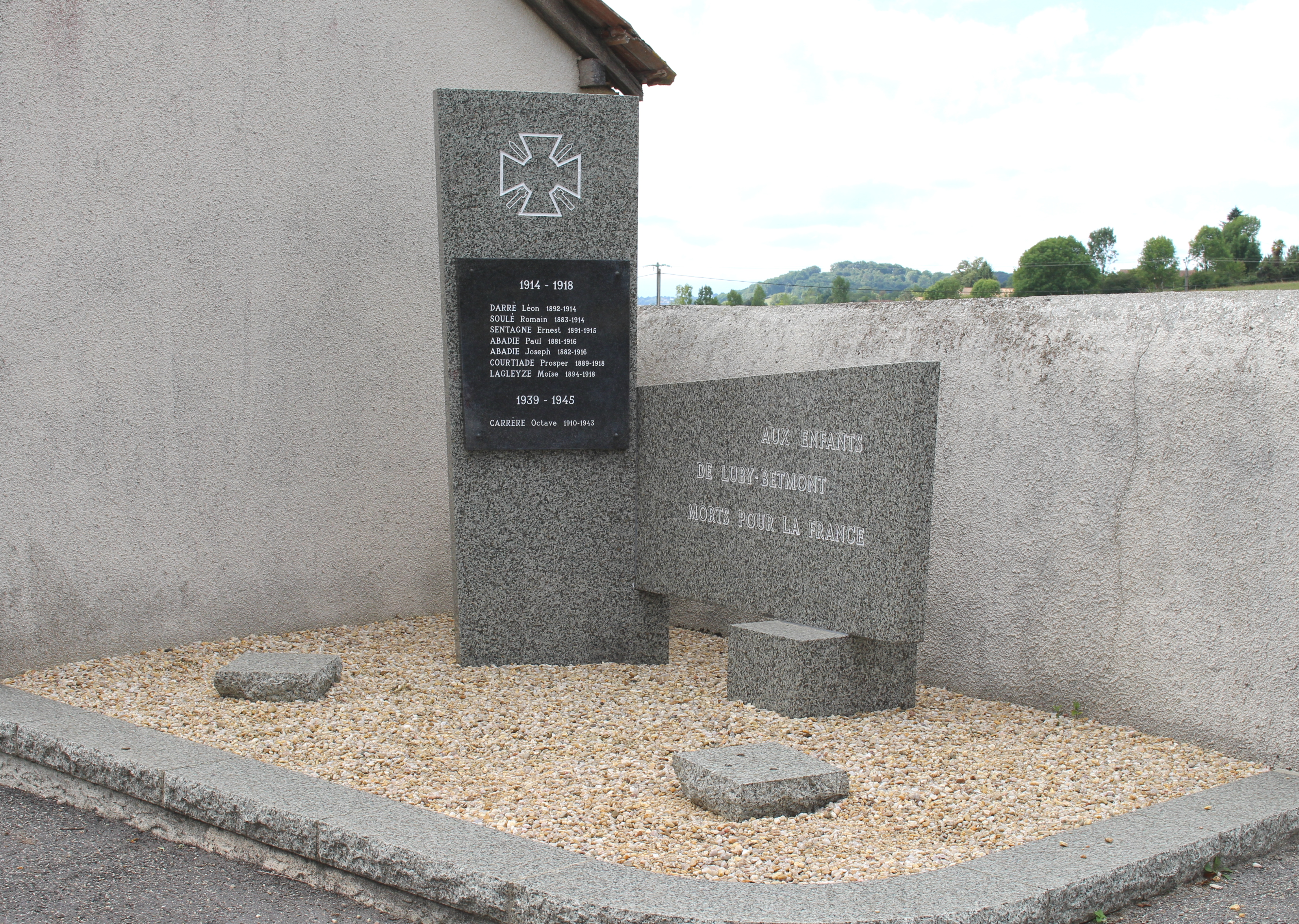 Monument aux morts de Luby-Betmont (Hautes-Pyrénées)